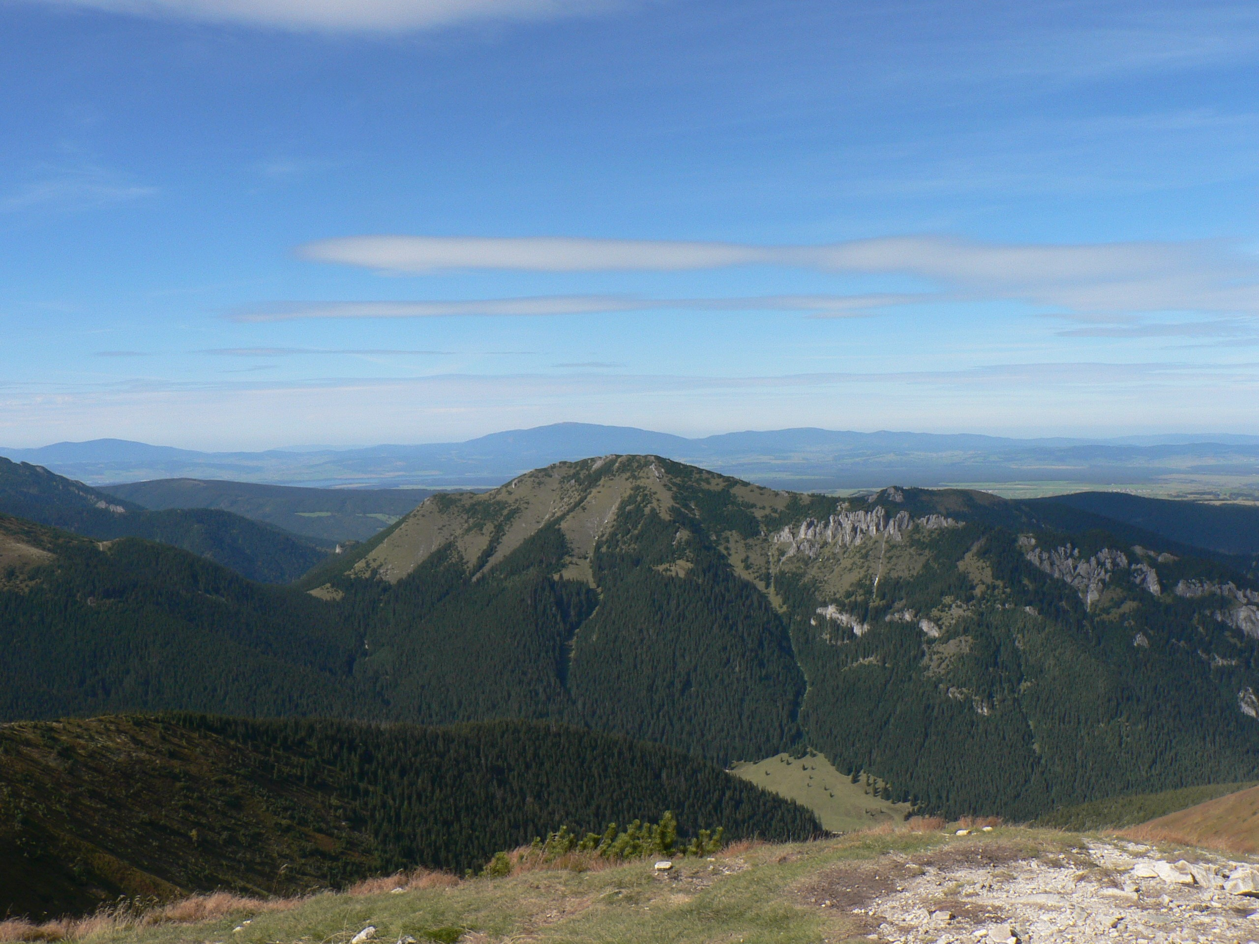 Bobrowiecka Przełęcz i Bobrowiec z Trzydniowiańskiego Wierchu